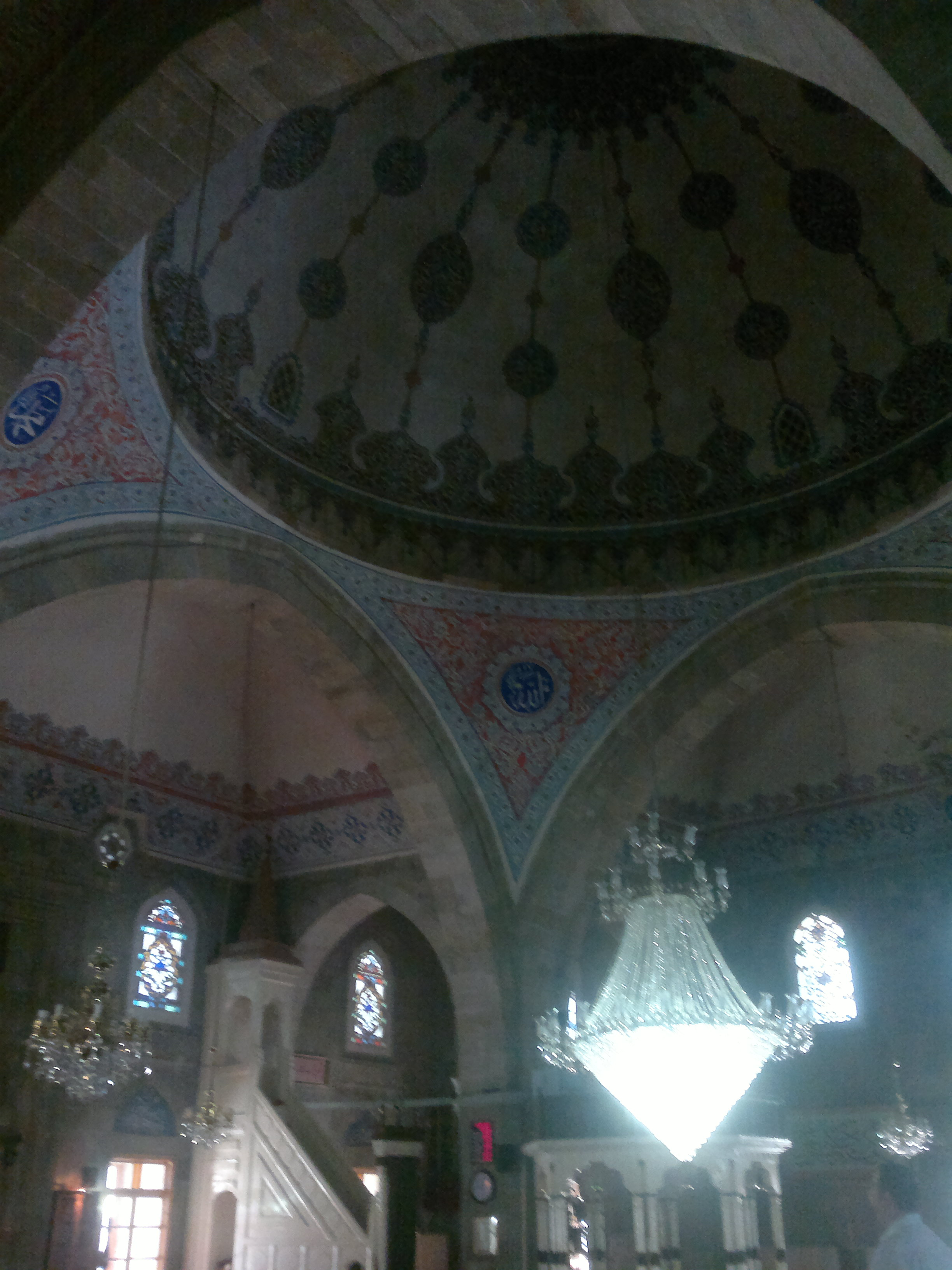 Erzurum Lala Mustafa Paşa Camii, Türkiye'de Erzurum İli merkez ilçesi Yakutiye'de 1562 yılında Lala Mustafa Paşa tarafından yaptırılmış Erzurum ’daki ilk Osmanlı camisidir.